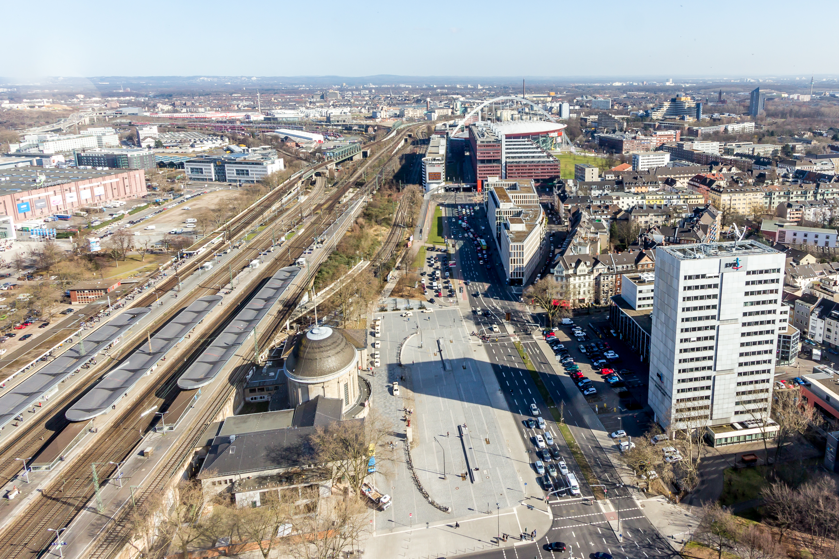 Bahnhof Köln Messe/Deutz mit dem 2014 neu gestalteten Bahnhofsvorplatz (Ottoplatz). Davor verläuft die Opladener Straße, rechts davon das LVR-Haus, im Hintergrund die Lanxess-Arena und das technische Rathaus der Stadt Köln. Blick vom KölnTriangle